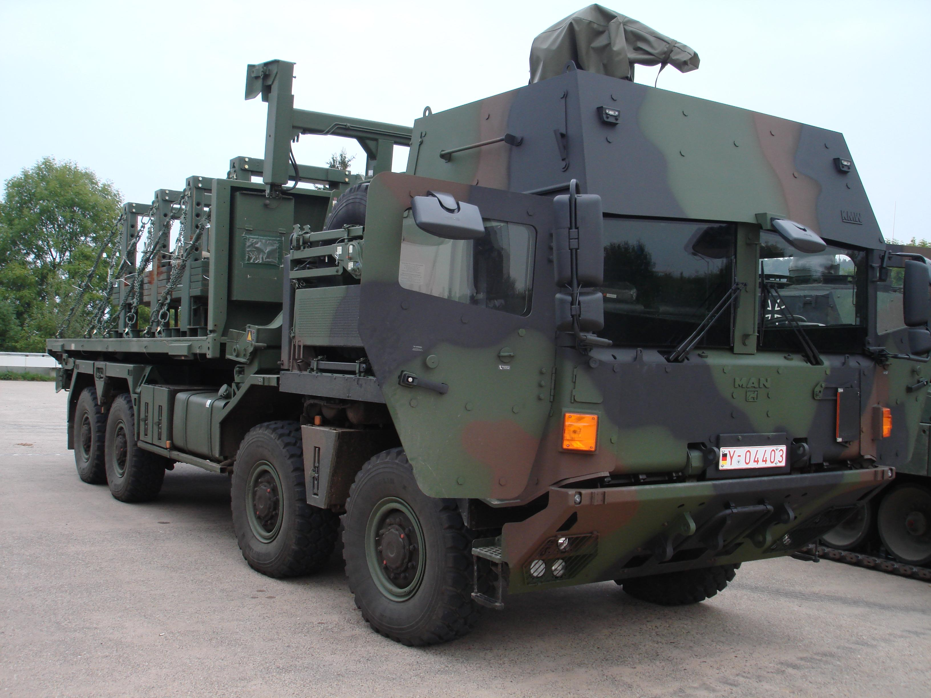 Gepanzertes Wechselladersystem MULTI. Als Basis dient das MAN-Fahrgestell 32.486 VFAEG. Als Waffenstation dient die mechanische KMW-Lafette Typ 1530.